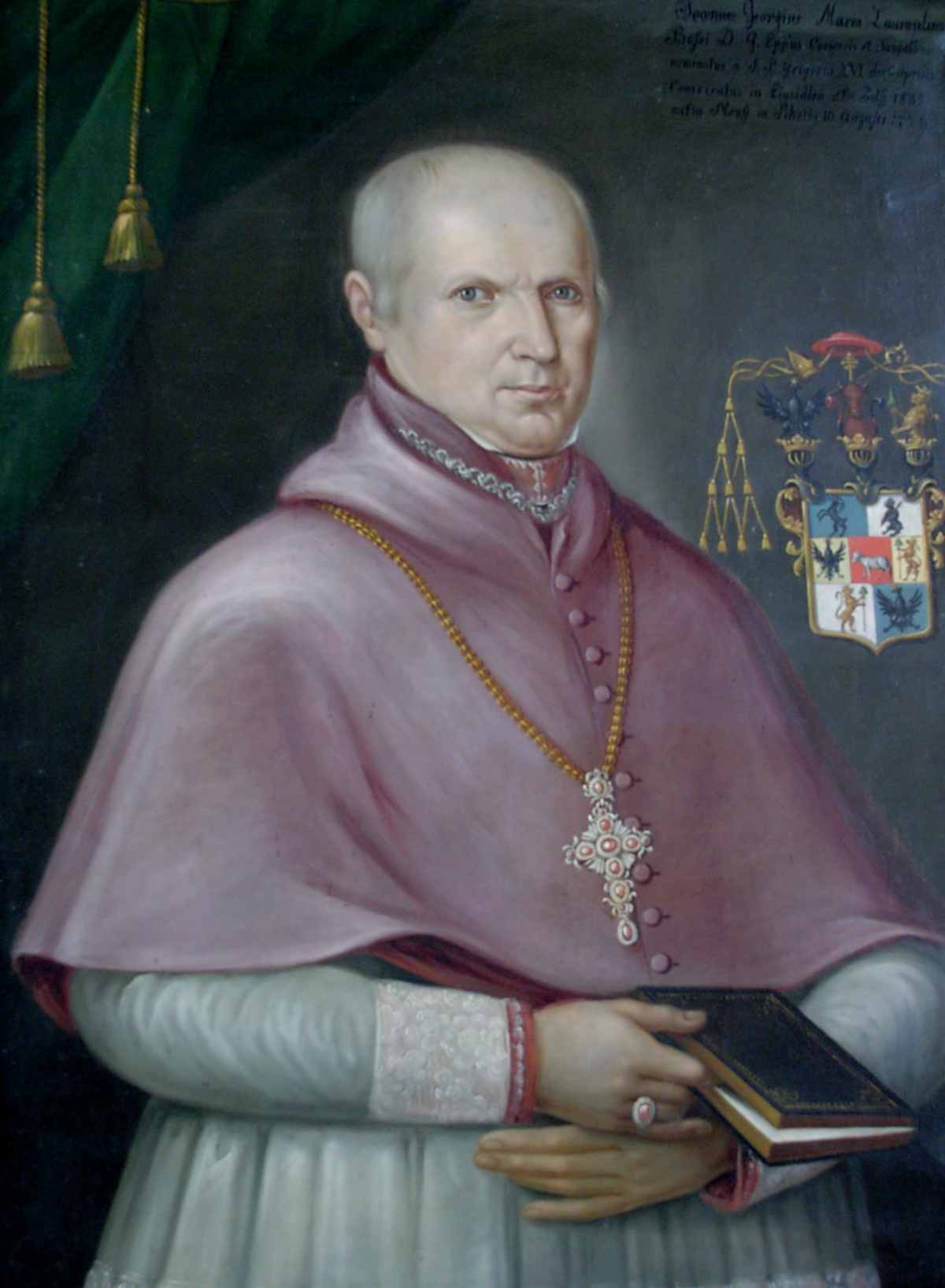 Johann Georg Bossi (1773-1844) Bischof von Chur-St. Gallen 1835-1844